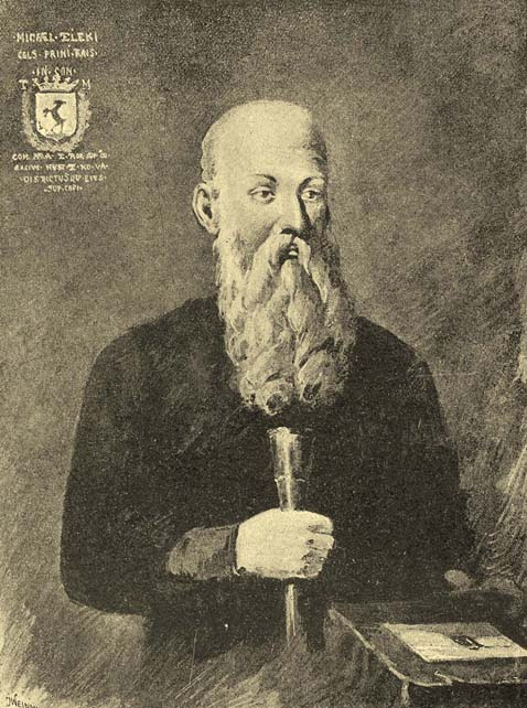 Teleki Mihály arcképe, amely gróf Teleki Sándor birtokában lévő egykorú olajfestményről készült. Felirata: MICHAEL • TELEKI CELS(issimi) • PRIN(c)I(pis) • TRANS(ilvaniae) • IN(timus) CON(siliarius) • COM(itatuum) • MARA(marosiensis) • ET TOR(densis) • SUP(remus) • CO(mes) • ARCIUM • HVST • ET • KO • VA(r) • DISTRICTVS QV(e) • EIVS • SVP(remus) CAP(itaneus)